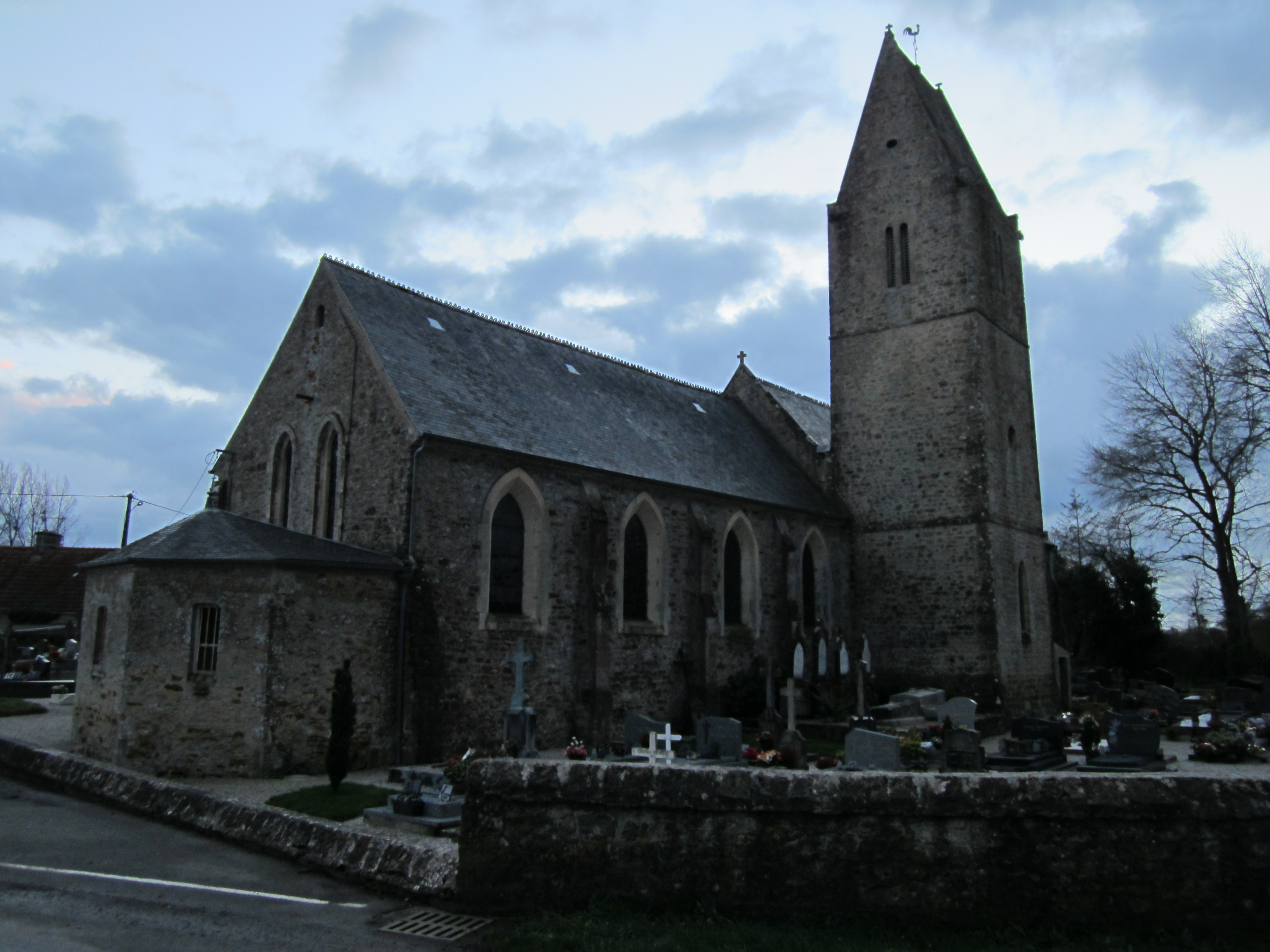 Église Saint-Germain de Saint-Germain-de-Tournebut